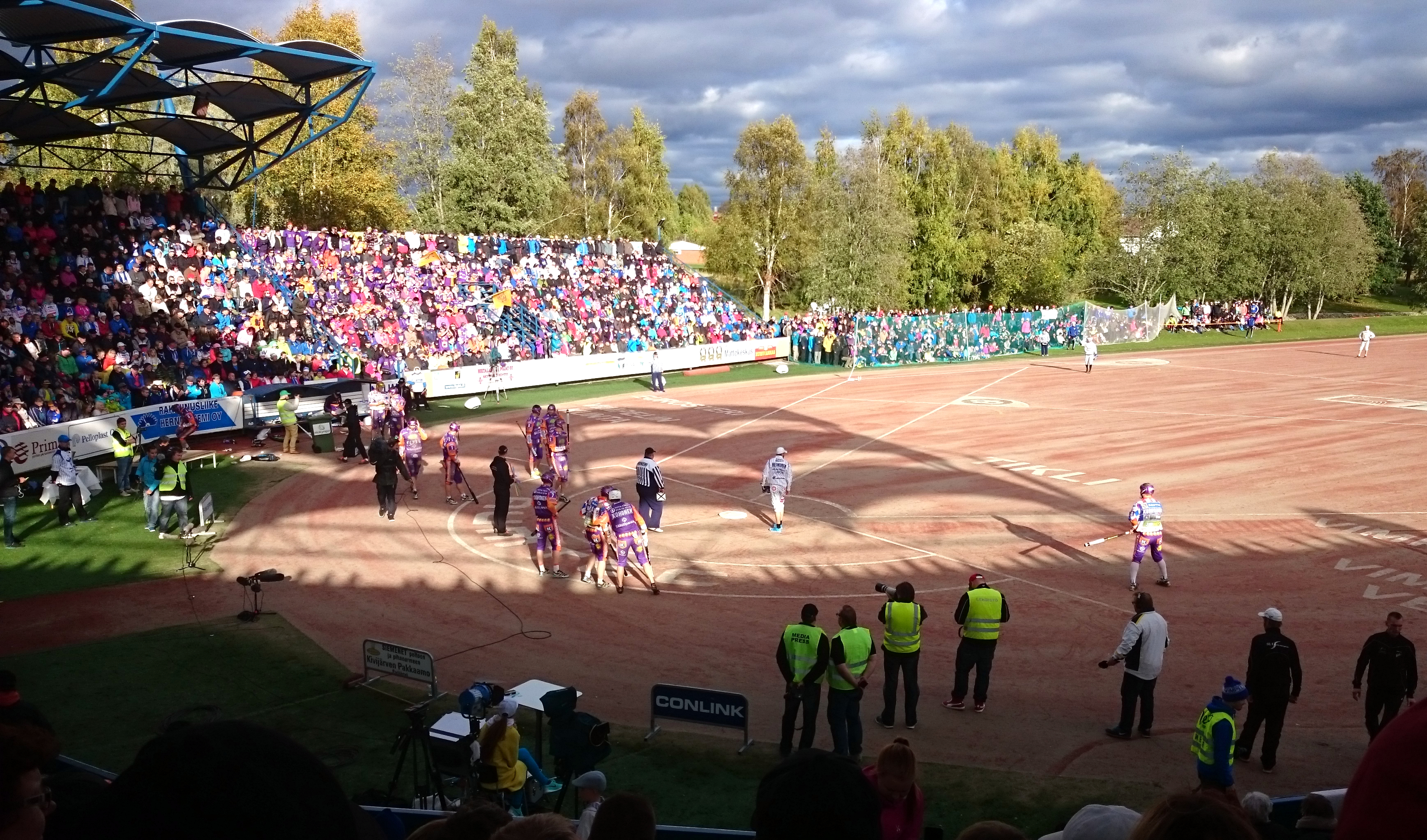 Vimpelin Veto - Sotkamon Jymy pesäpallo-ottelu 19.9.2015.